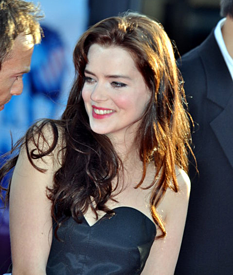 Roxane Mesquida au festival de Deauville pour le film Kaboom